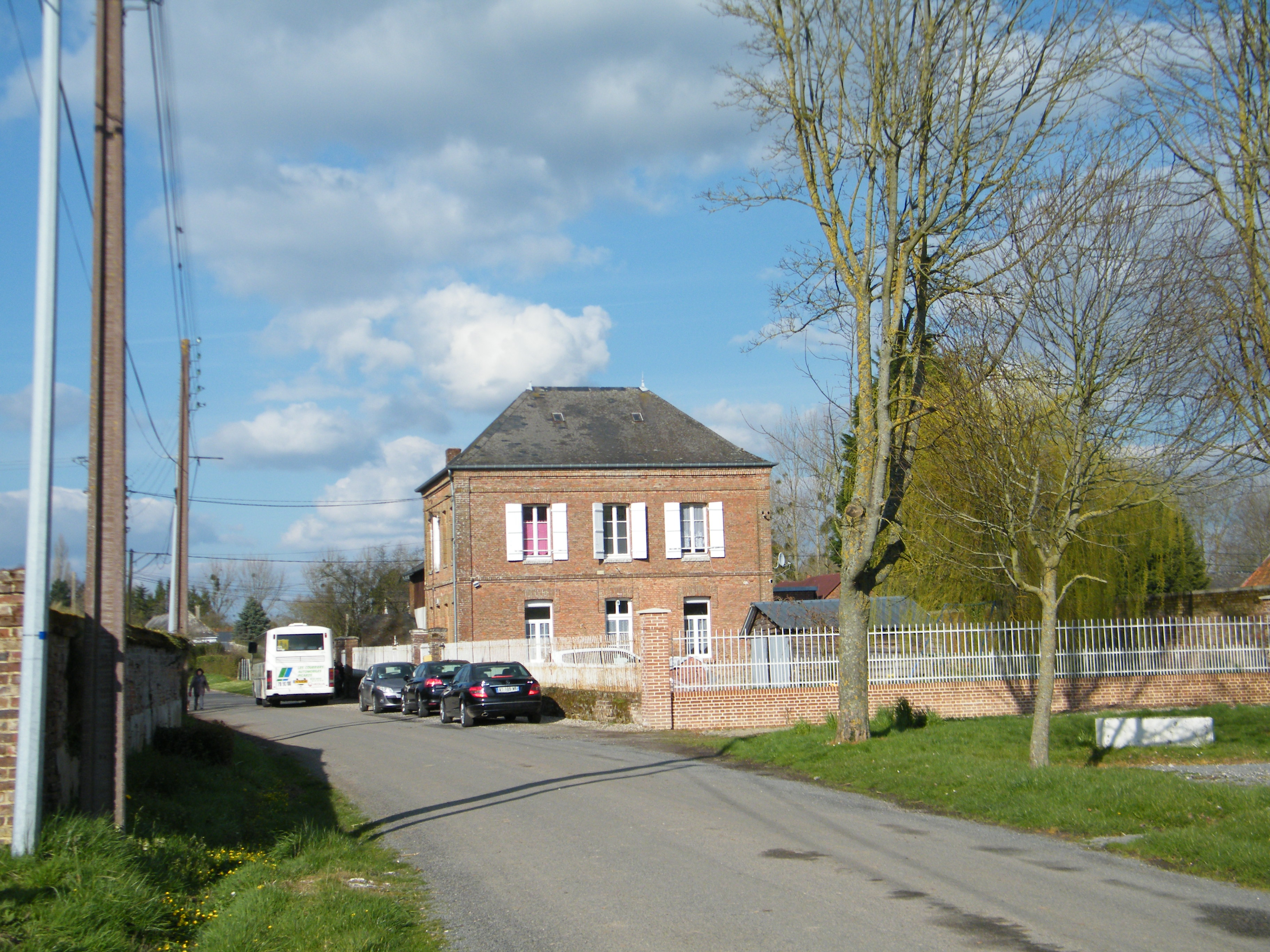 Bâtiments communaux : mairie et école.